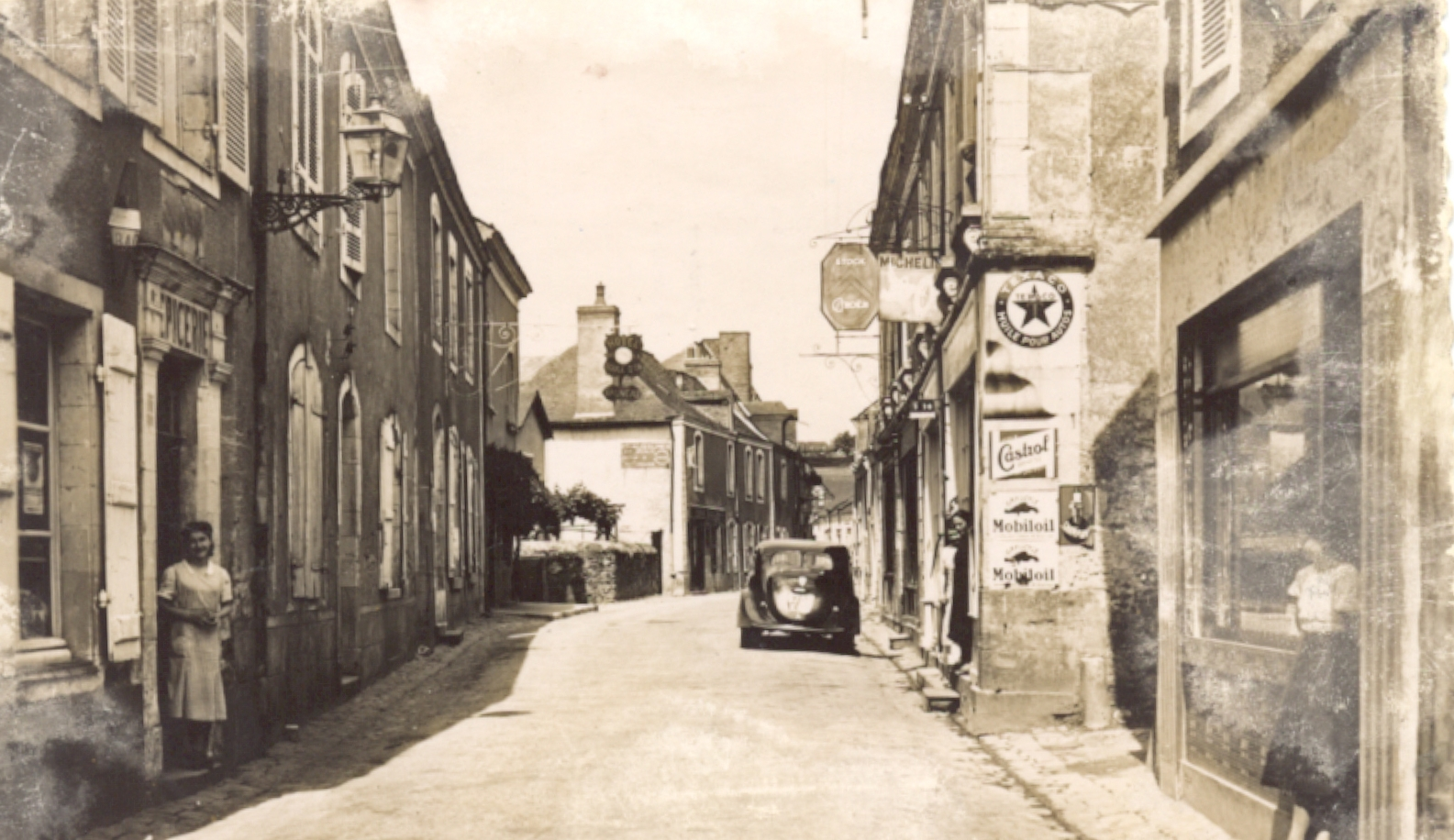 Grande rue, St Denis d'Anjou (france)